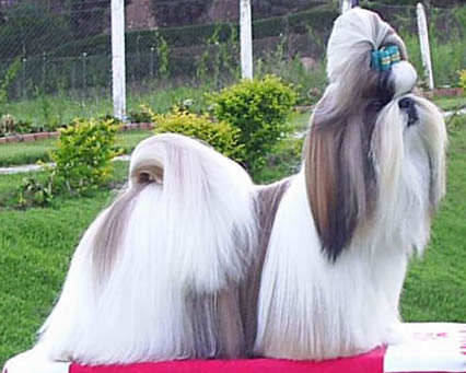 Exemplar da raça Shihtzu praparado para campeonato. Cão pertencente ao Canil Dirraus de Araras/SP.